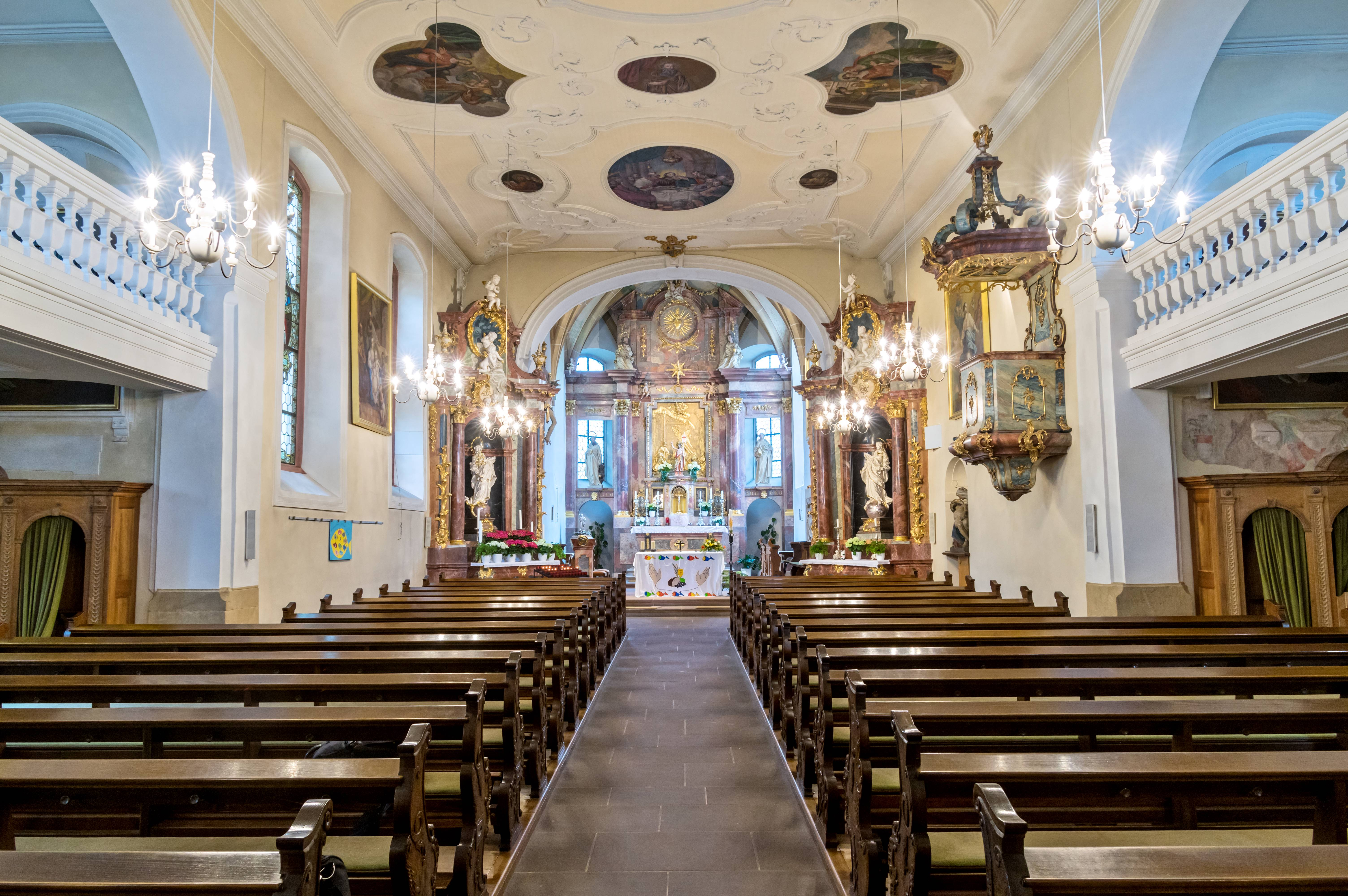 Bilder von St. Gallus und Otmar in Ebringen Blick zum Altar